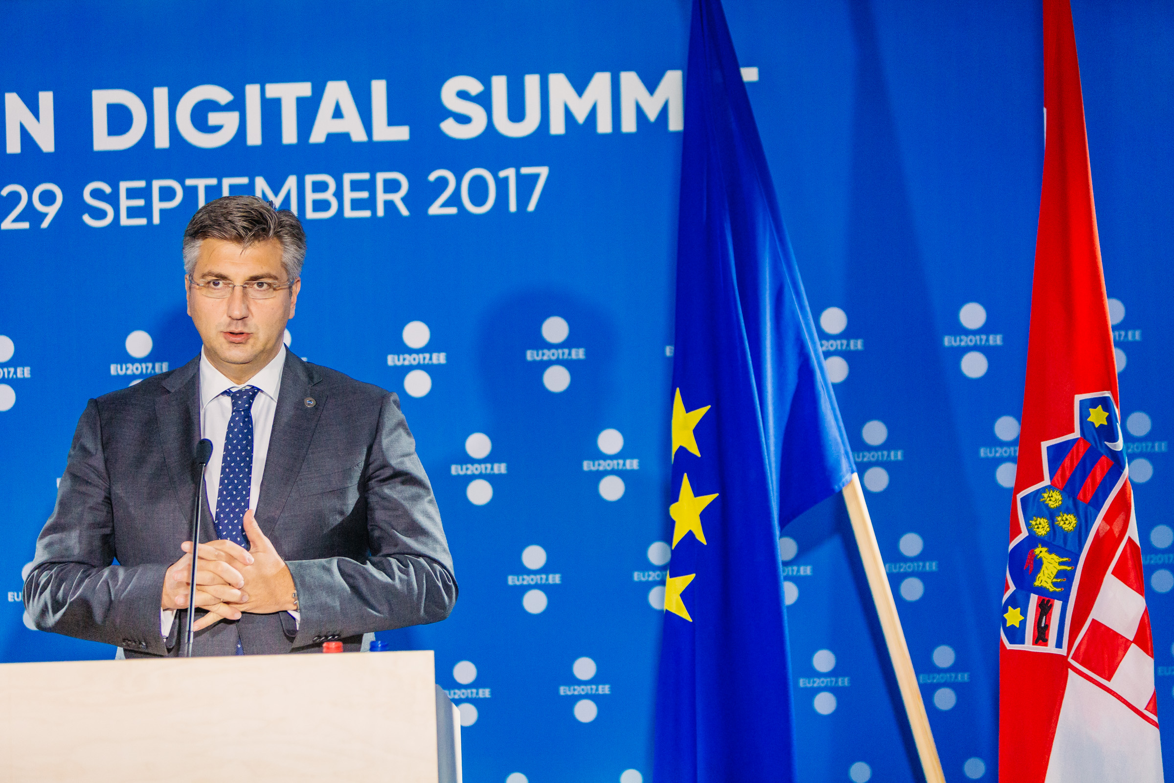 Andrej Plenković, Prime Minister, Romania Photo: Arno Mikkor (EU2017EE)